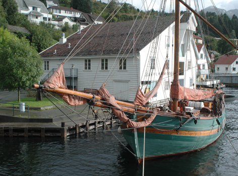 Norsk (nynorsk): Nesasjøhuset på Sand, hovudsete for Ryfylkemusest